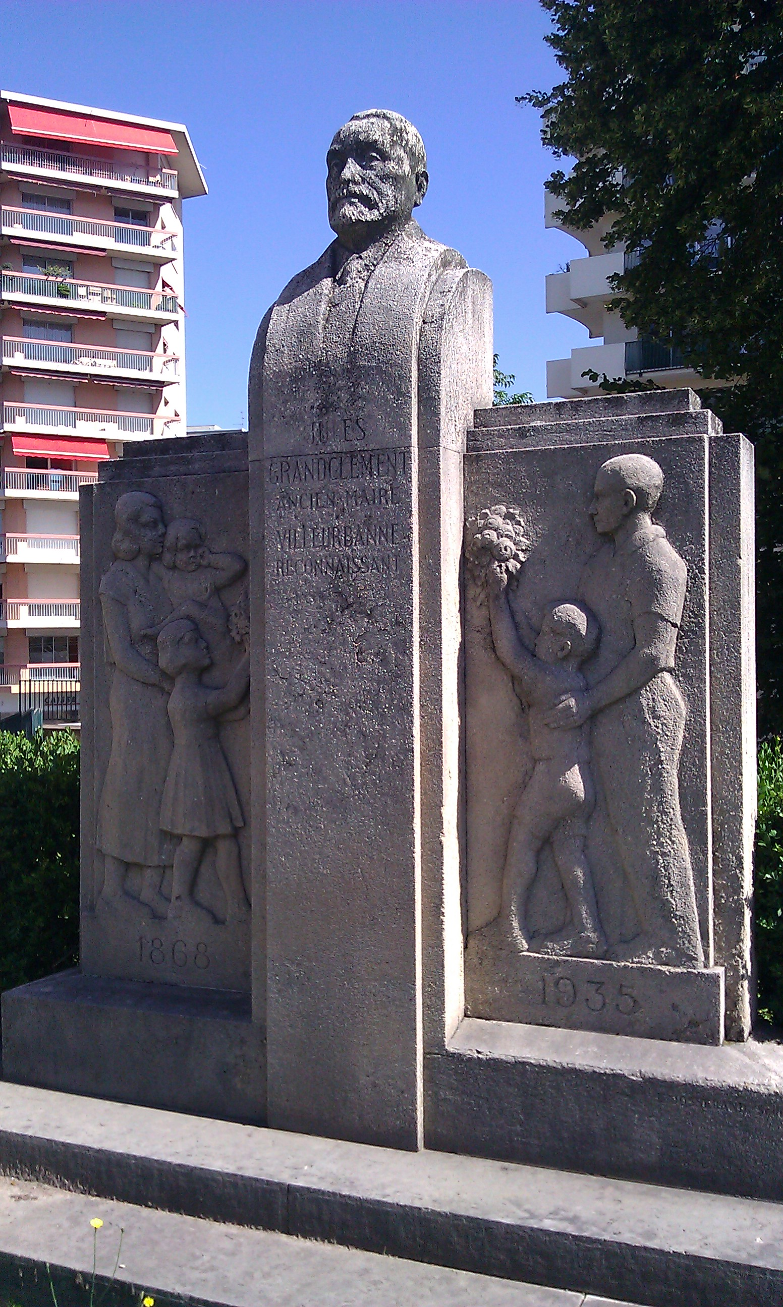 Statue de Jules Grandclément, ancien maire de Villeurbanne. Mention au pied de la statue "L. Josserand, sculpteur. Non daté. Texte : "Jules Grandclément - Ancien maire - Villeurbanne reconnaissant - 1868-1935"